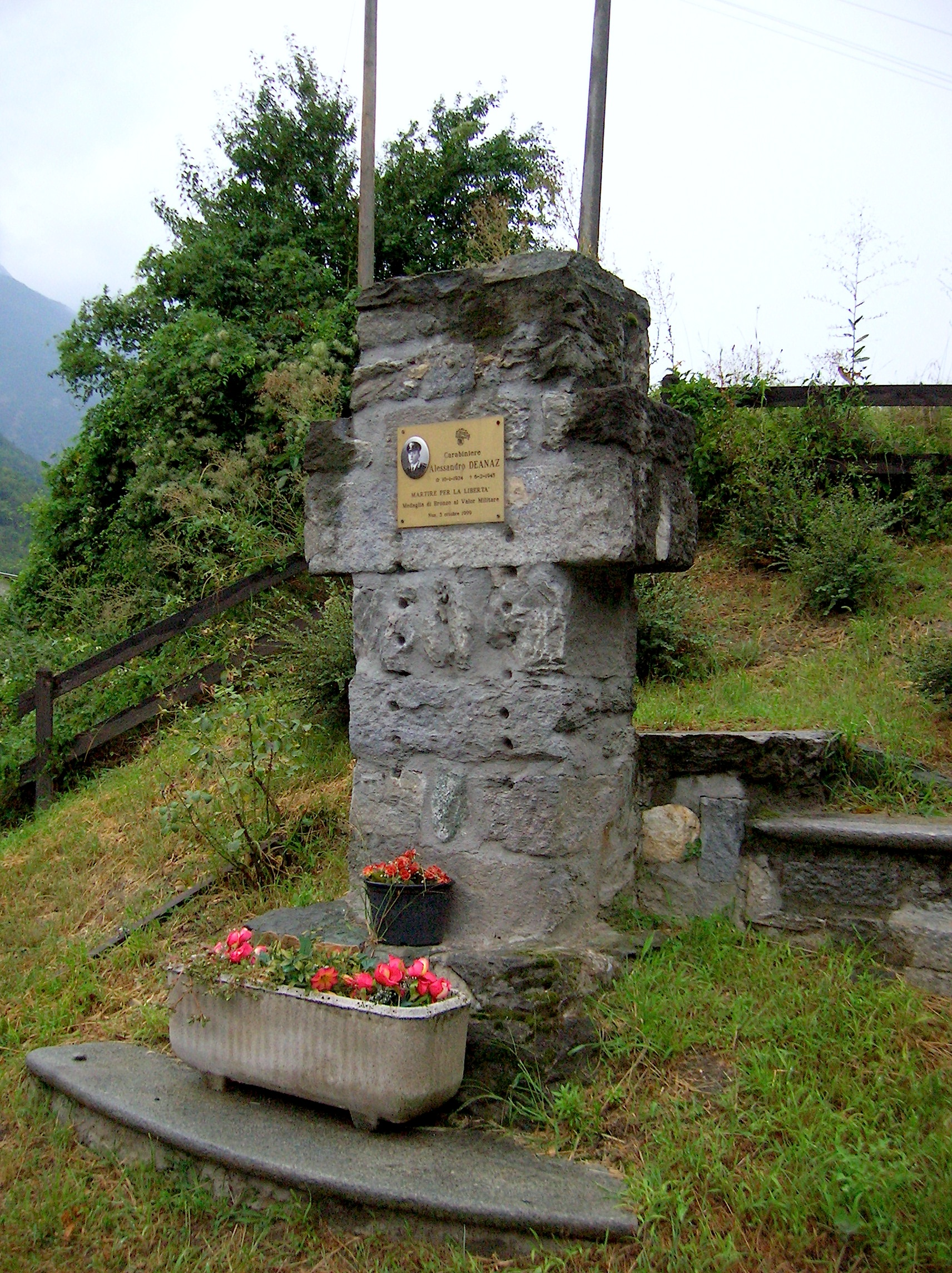 cippo alla Stazione di Nus, Nus, Valle d'Aosta, Italia.